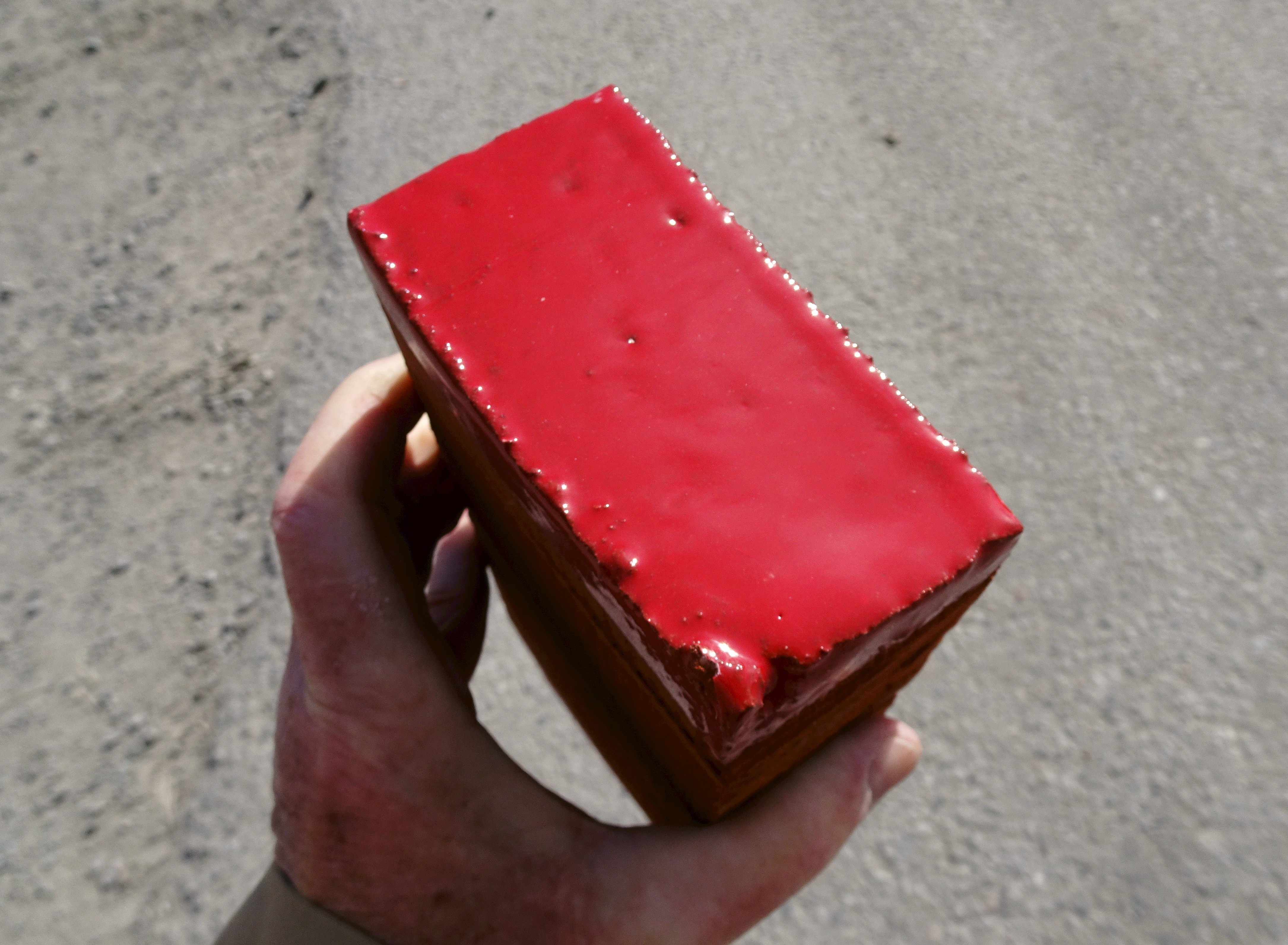 Kvarteret Muddus, Norra Djurgårdsstaden, arkitekt Wingårdh